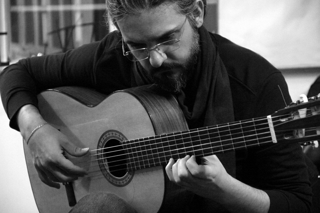 روزبه آذر در حال تمرین